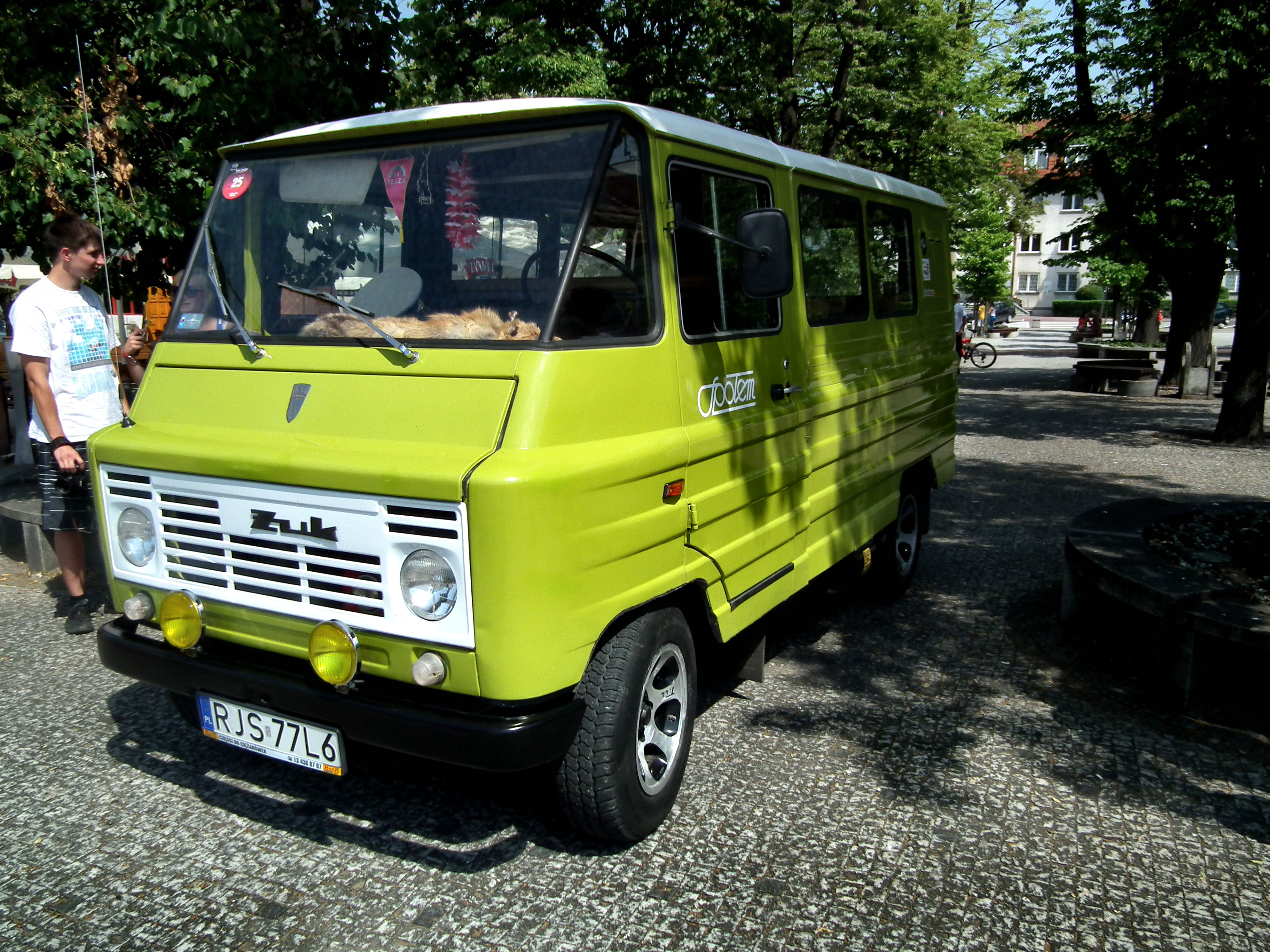 FSC Żuk A-07 z 1976 roku w Jaśle.